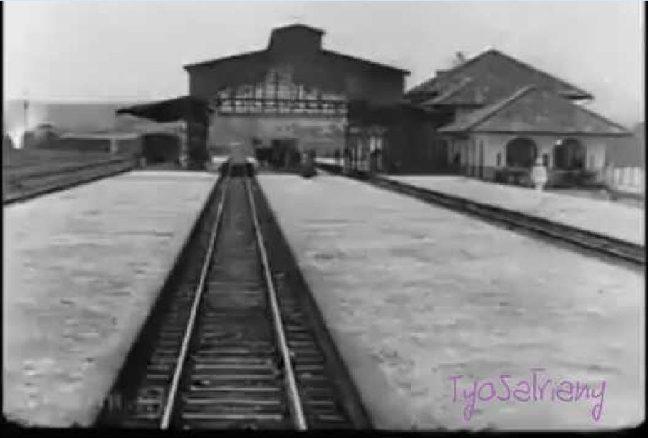 Kereta Api Indonesia Staatsspoorwegen (SS)